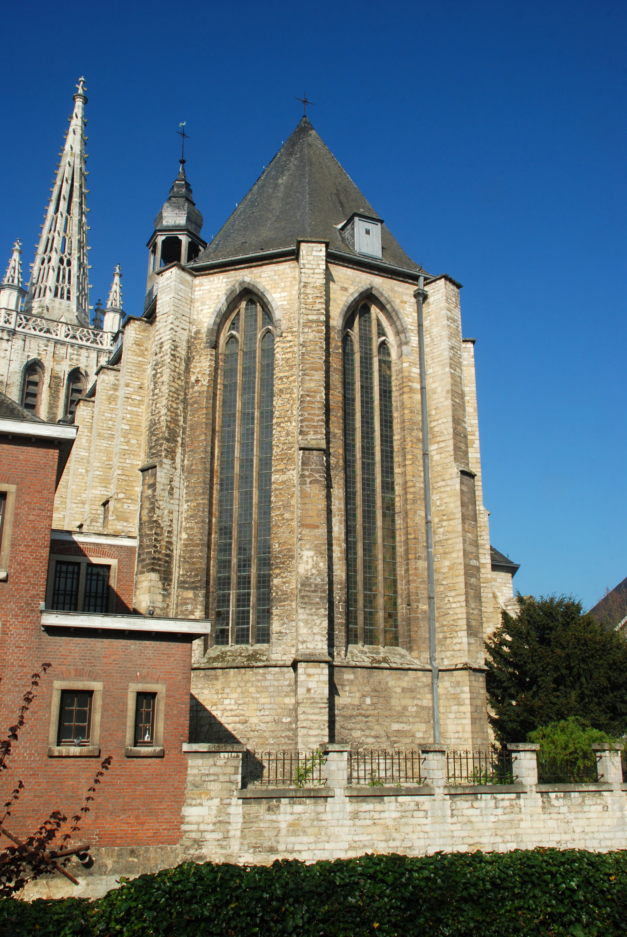 Belgique - Louvain - Église Sainte-Gertrude - chevet